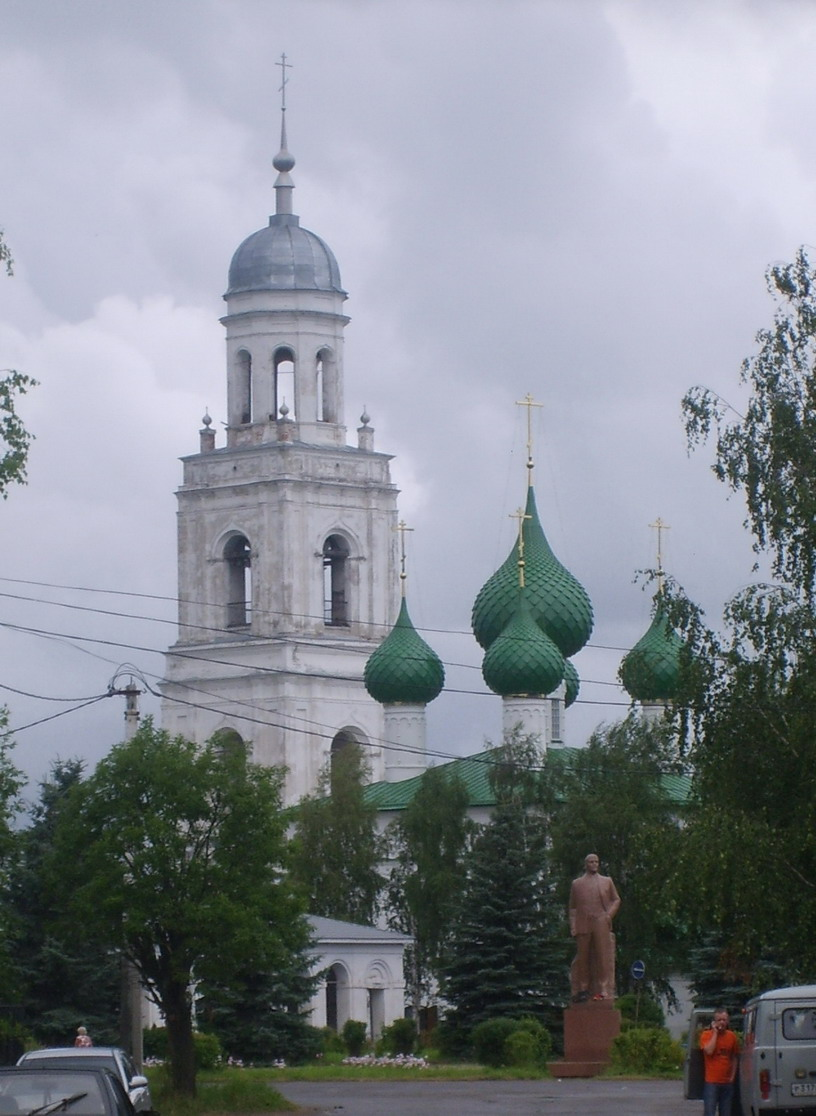 Церковь, на центральной площади Пошехонья. Перед ней памятник Ленину.